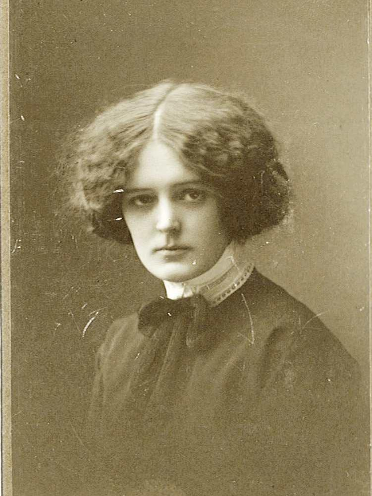 Dagmar Bryhl